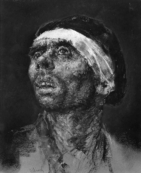 Drawing; Drawings